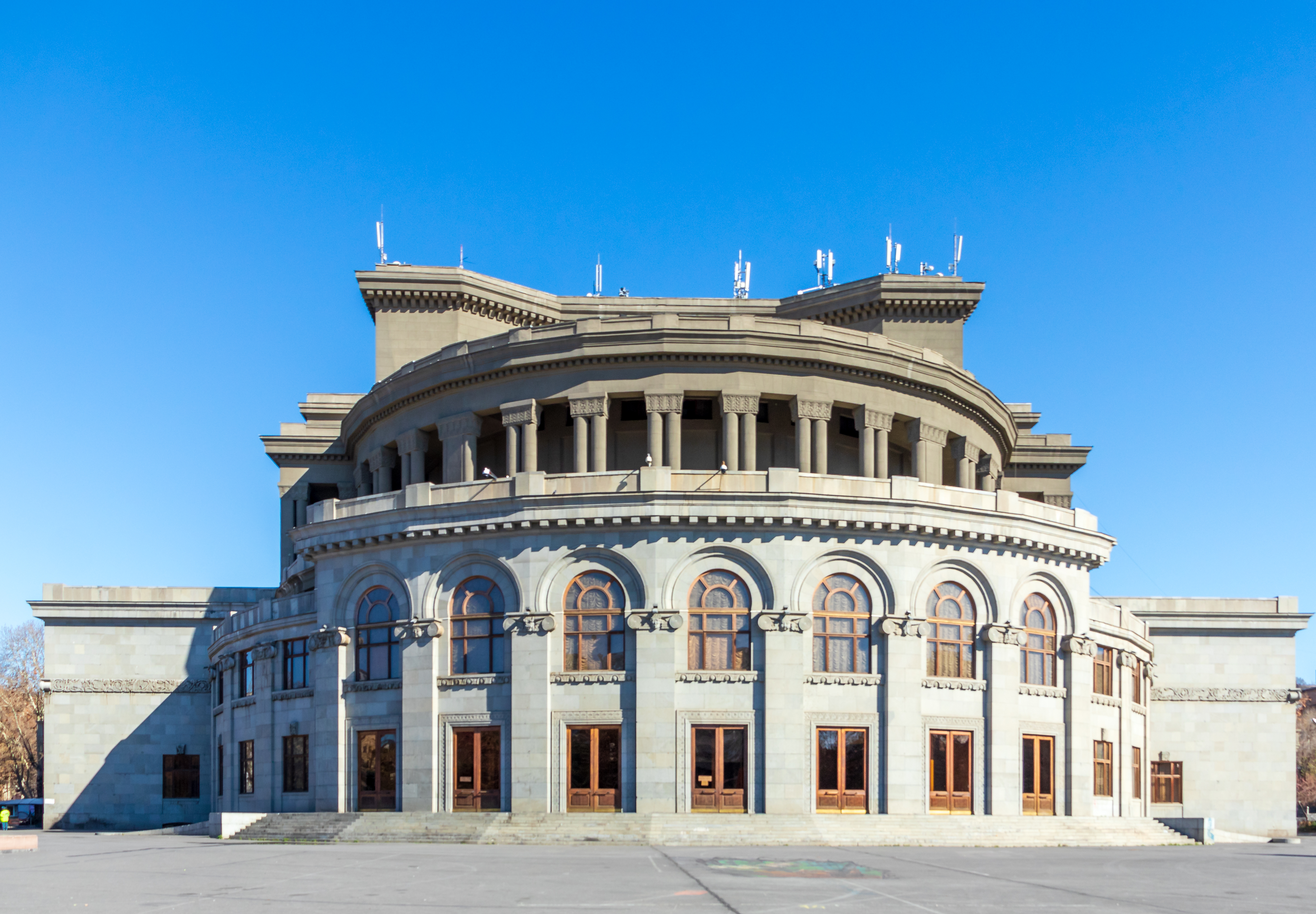 Exterior of Opera house of Yerevan